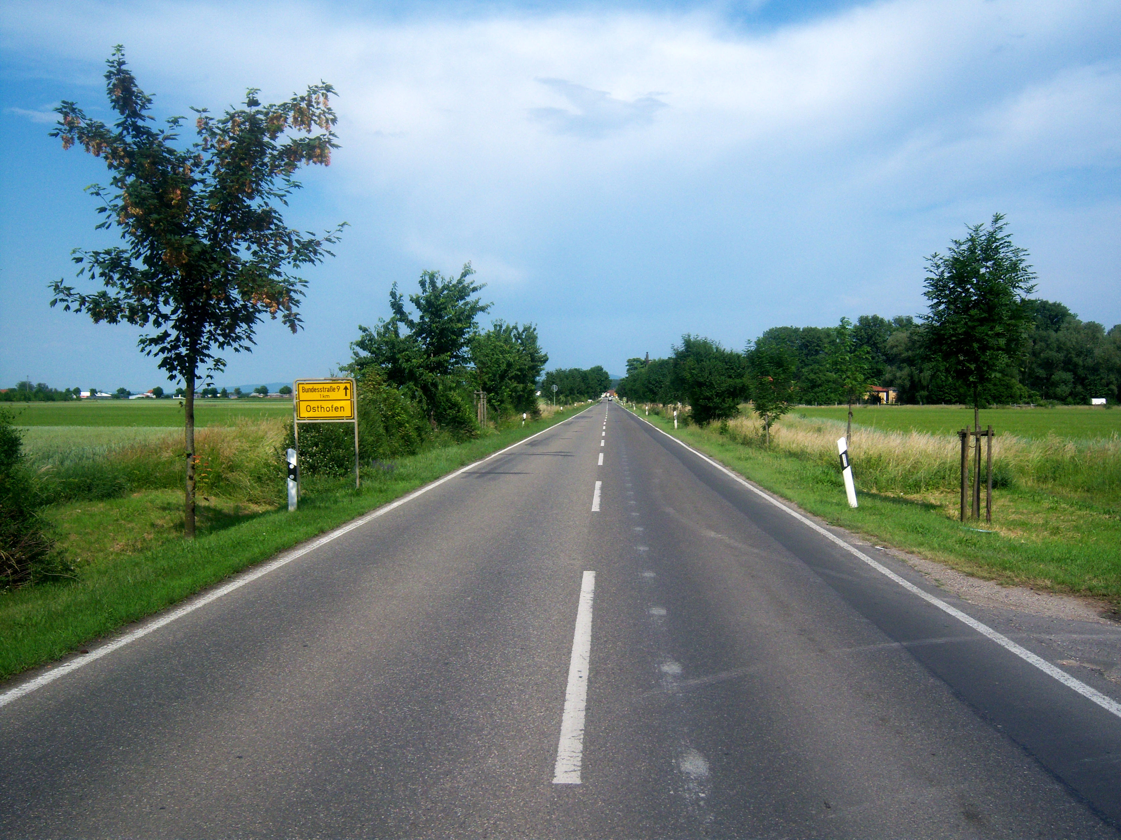 Ortsausfahrt von Osthofen in Rheinhessen in Rheinland-Pfalz (Deutschland) zur Bundesstraße 9